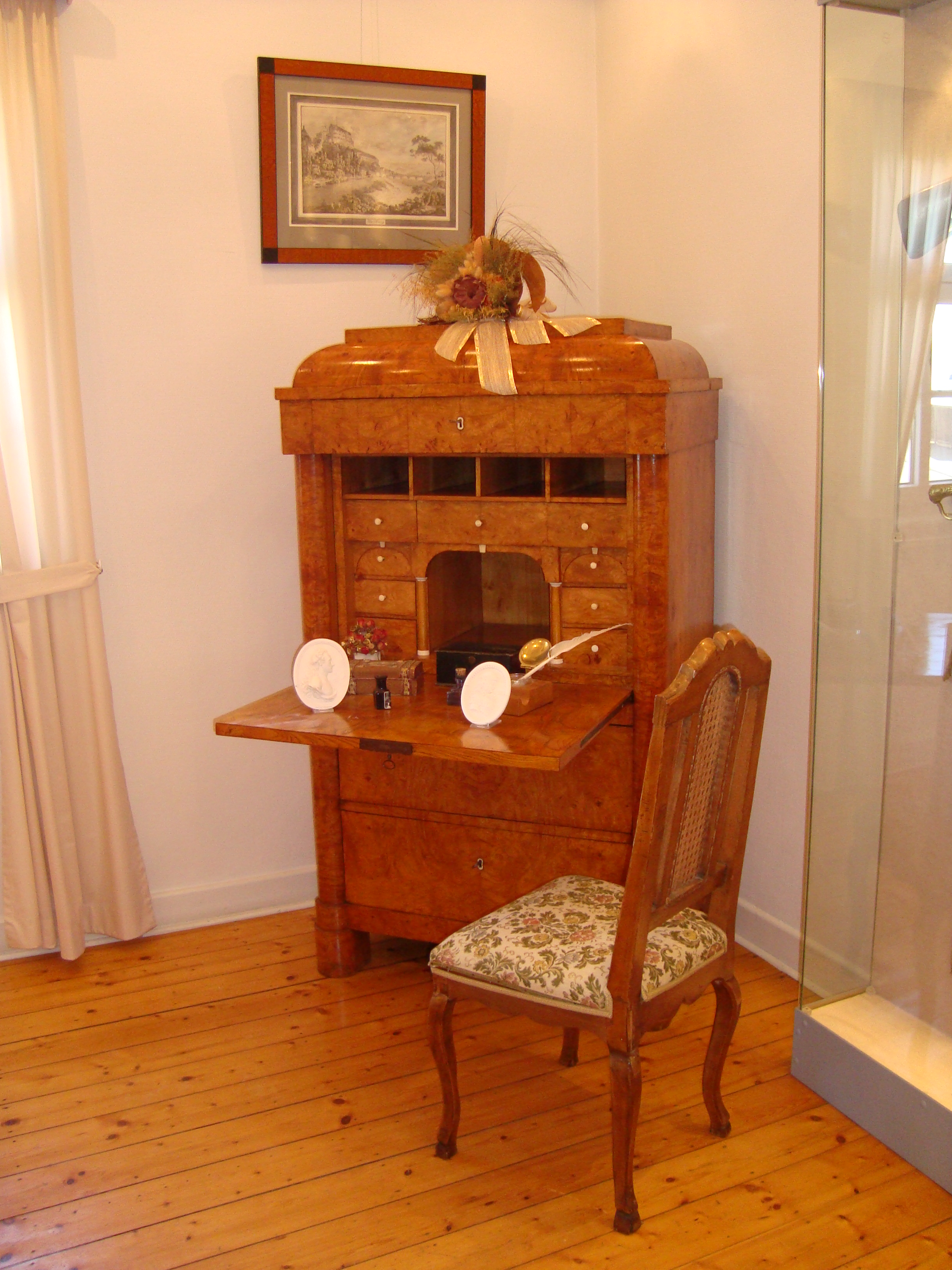 Sekretär im Goethehaus Volpertshausen